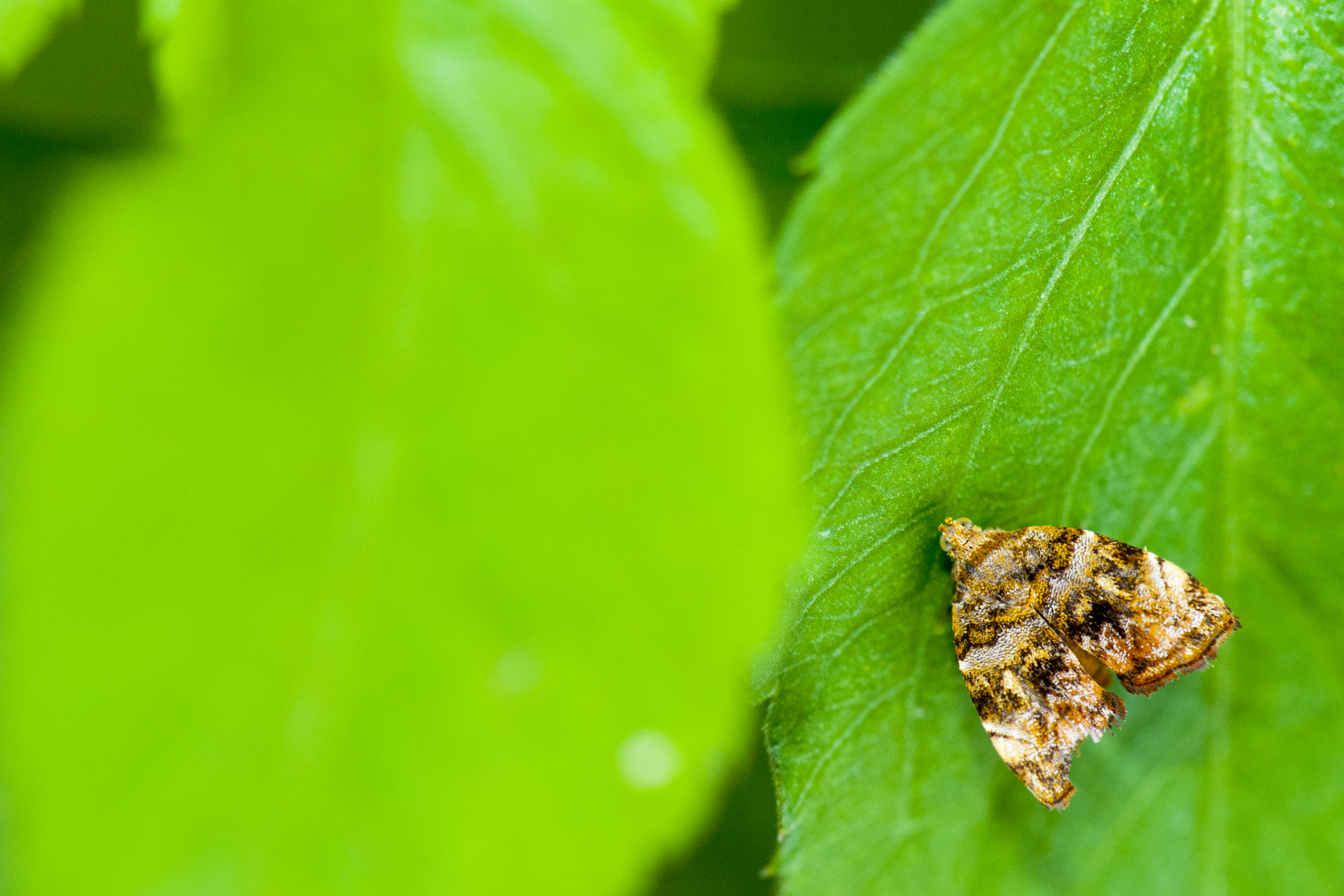 _DSK3196 Choreutis hyligenes